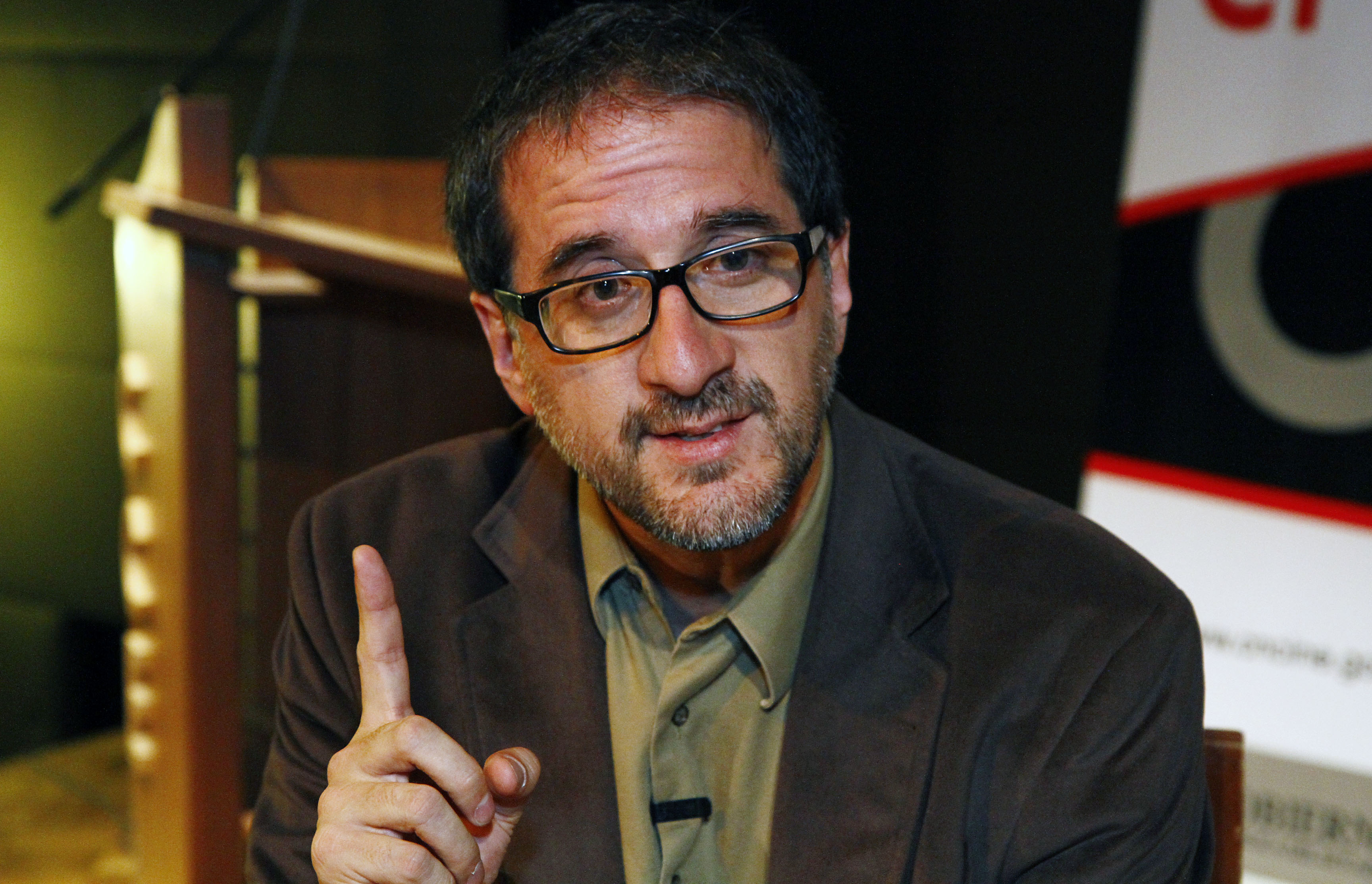 Quito, 11 mar (ANDES).- Juan Martín Cueva, Director del CNCine, en entrevista para la Agencia de Noticias Andes. Foto: Micaela Ayala V./ANDES